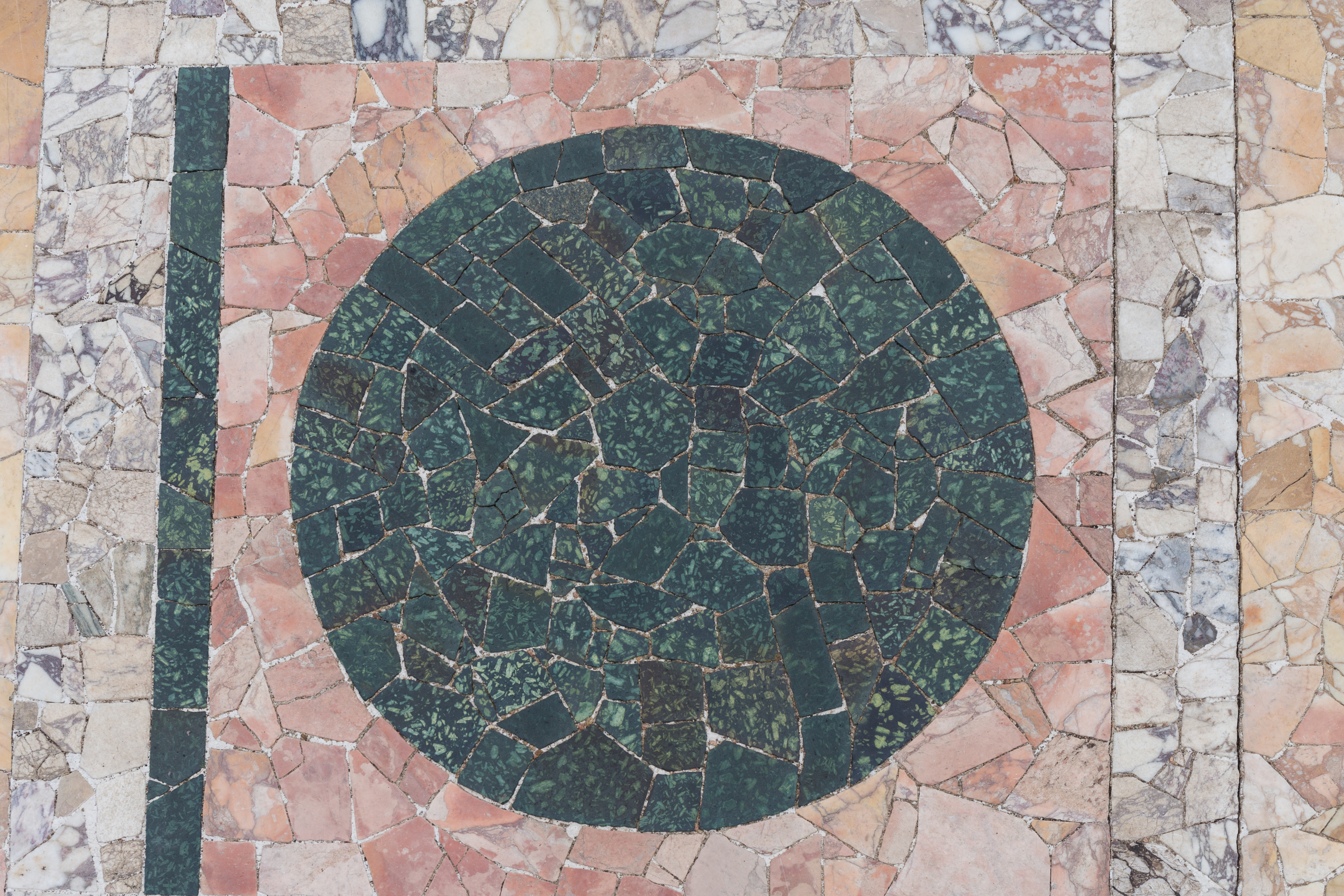 Odéon antique dans le 5e arrondissement de Lyon : pavement de l'orchestra, détail : cercle de porphyre vert de Grèce entouré de marbre rose de Carrare. .